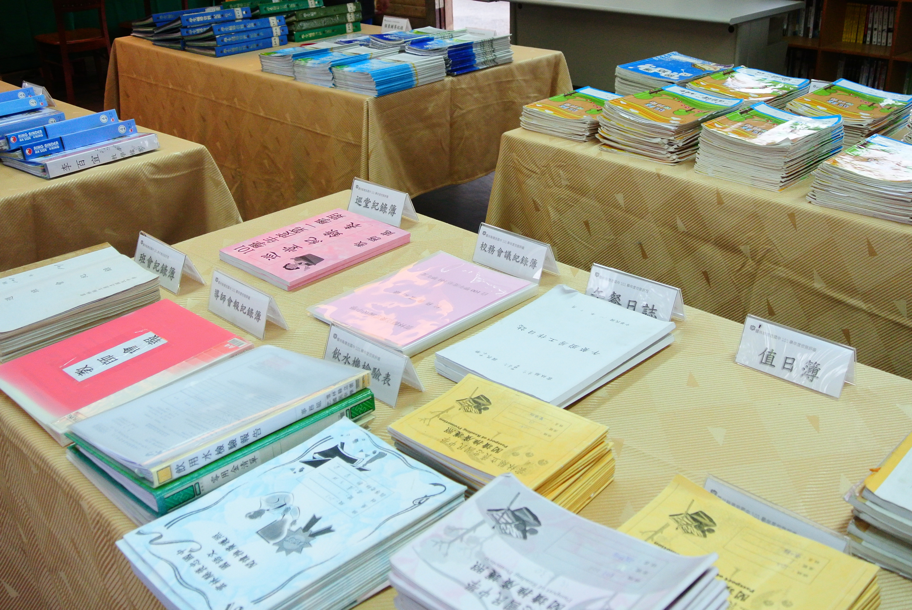 中文（台灣）: 褒忠國中校務評鑑提供給評鑑委員的檔案